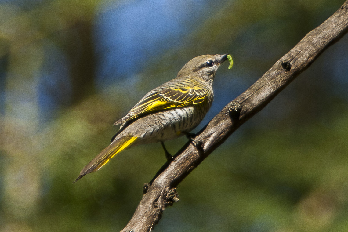 Black Cuckoo-Shrike fem - Kenya 0322